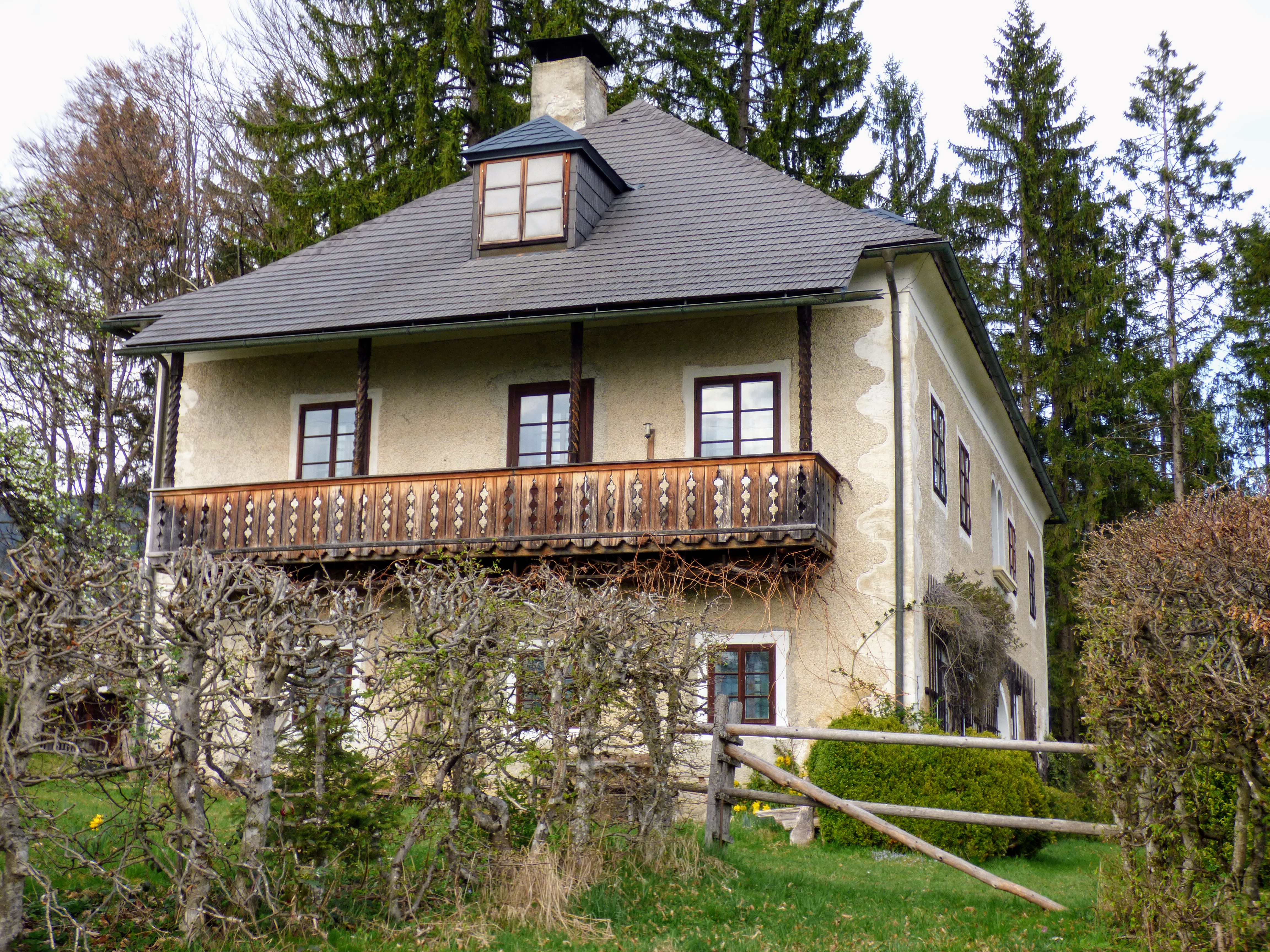 Schloss Bichlhof, Bichlhof 1, Gemeinde Sankt Stefan im Gailtal (Kärnten)